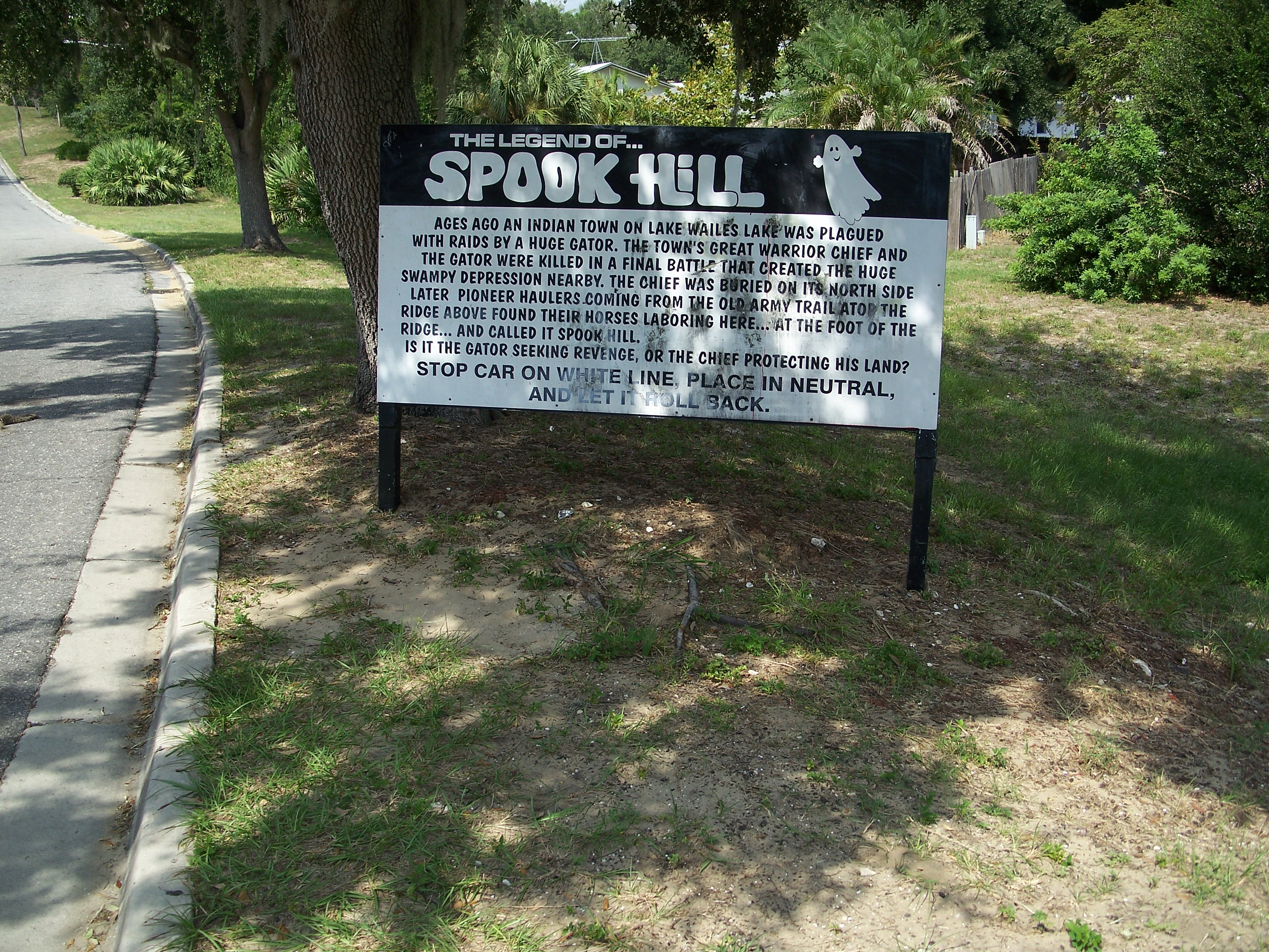 Lake Wales, Florida: Spook Hill: Sign